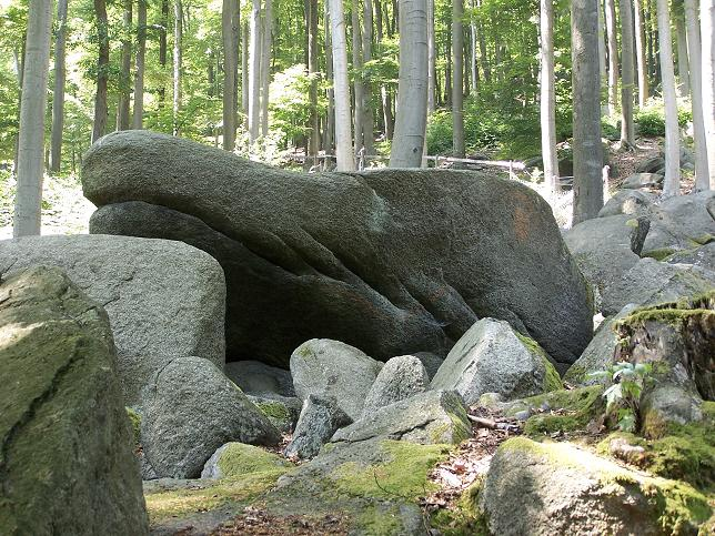 Naturschöpfung „Krokodil“-Felsen im Felsenmeer (Lautertal)